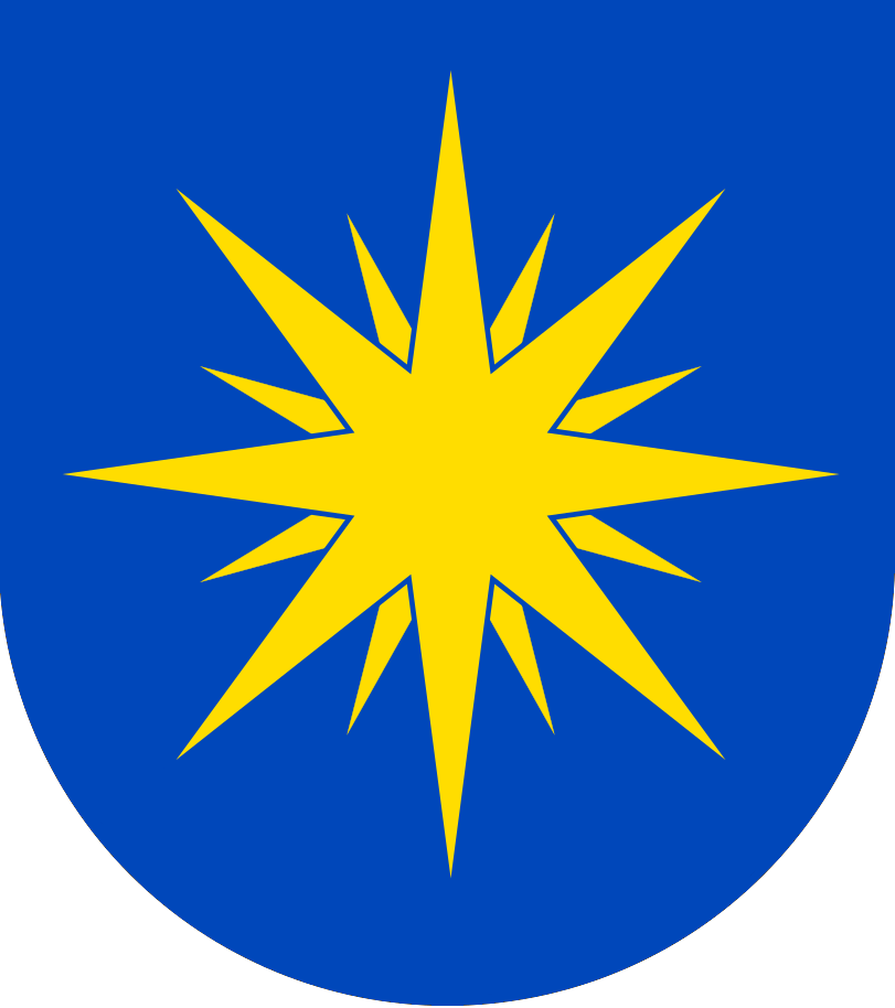 Zlatá šestnáctihrotá hvězda se střídajícími se delšími a kratšími paprsky v modrém poli. Nejedná se o zářící osmihrotou hvězdu Dědic.